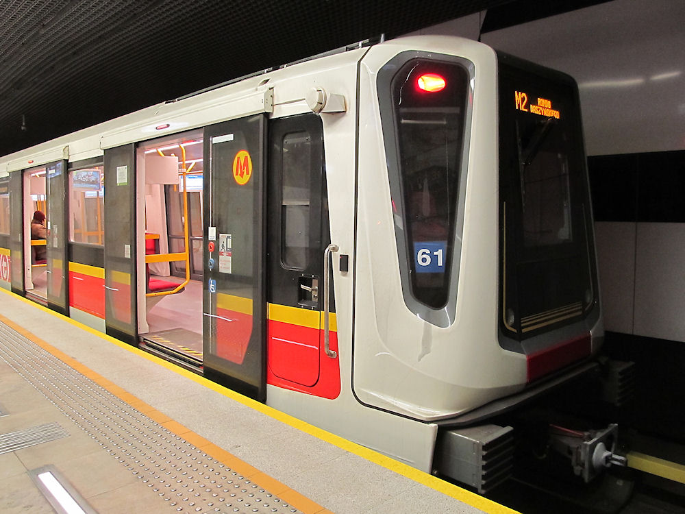 Metro Rondo ONZ. 17.12.2018 r.